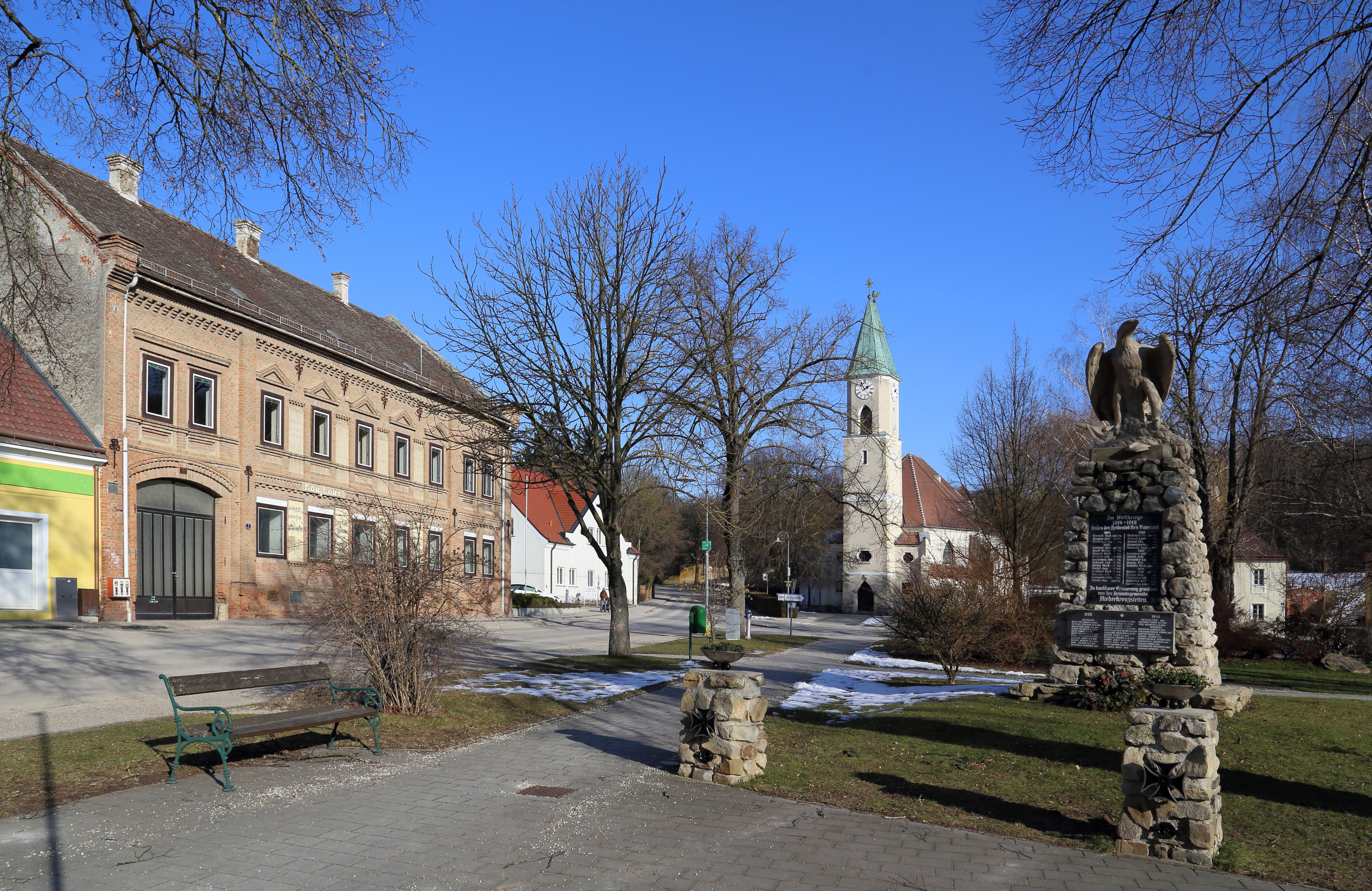 Ortszentrum von Niederkreuzstetten, ein Ortsteil der niederösterreichischen Marktgemeinde Kreuzstetten.